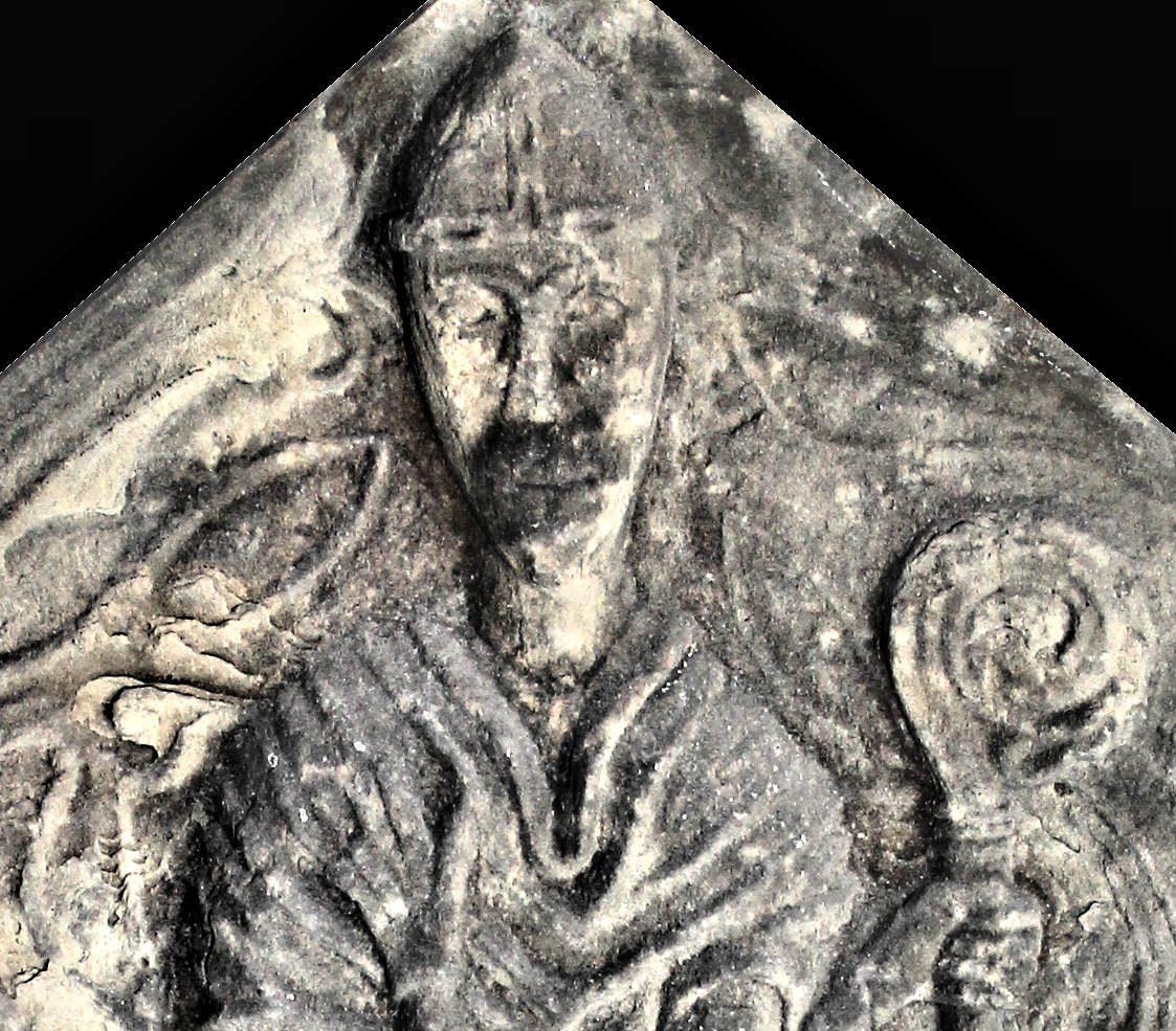 Sant Saeran o garreg o Eglwys Sant Saeran, Llanynys. Addasiad o: y ffotograff hwn